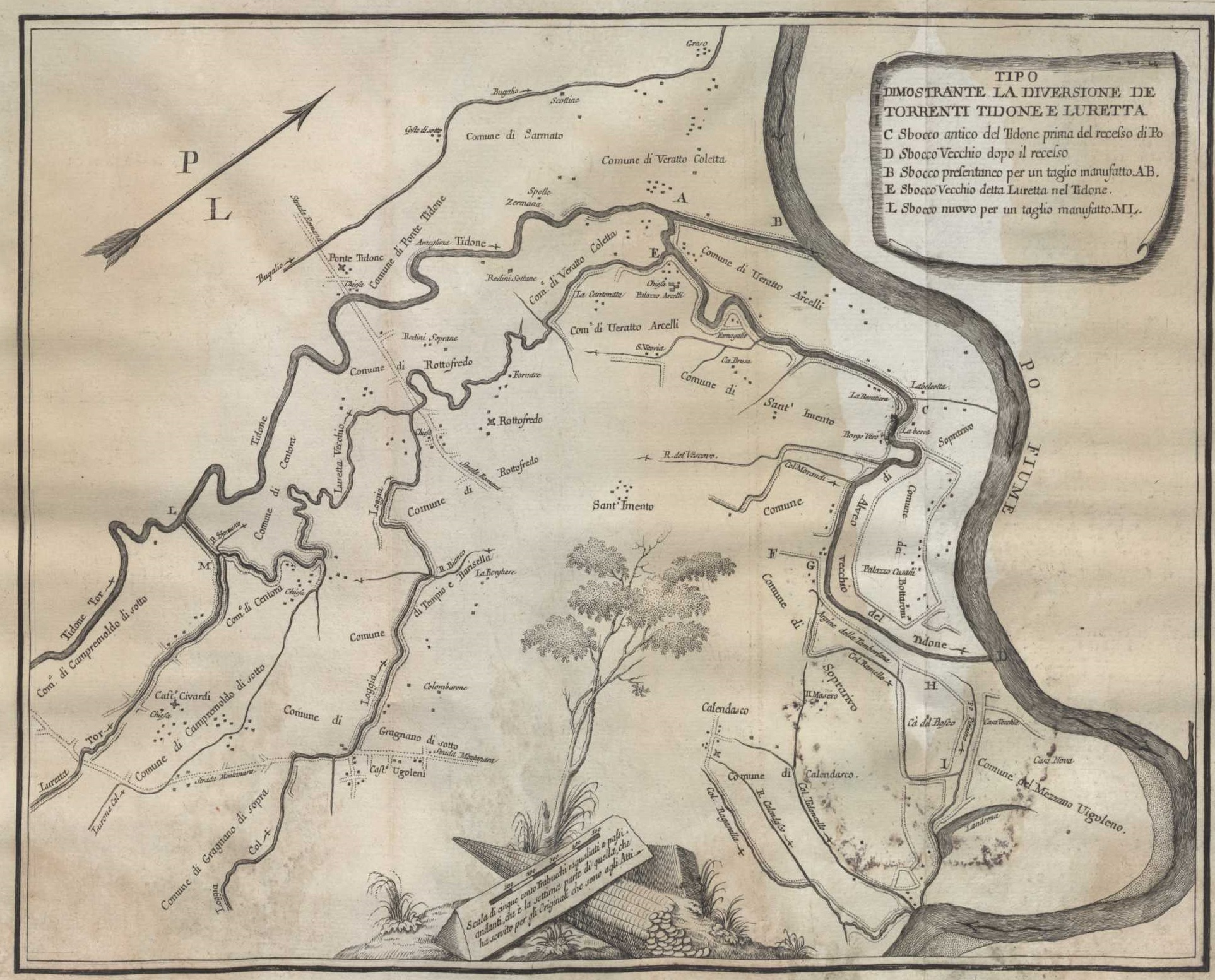 Mappa del fiume Tidone tratta da Intorno al nuovo taglio del Tidone e della Luretta